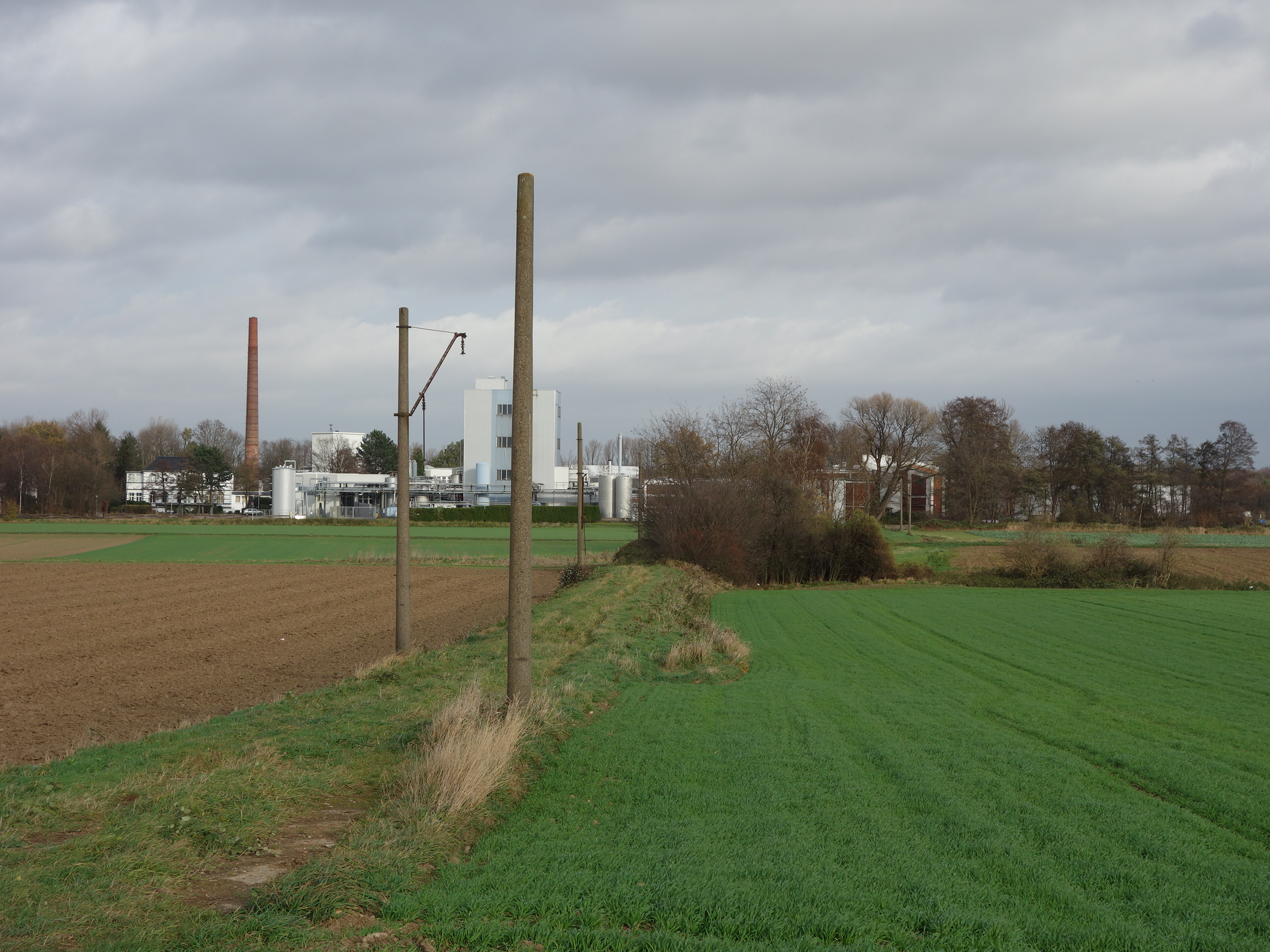 Trasse des früheren Gleisanschlusses der Pulverlack-Fabrik CWS Powder Coatings GmbH zur meterspurigen Überland-Straßenbahnstrecke Düren - Inden der in den 1960er Jahren stillgelegten Dürener Eisenbahn AG (DEAG). Auf dem Werksgelände befand sich bis zum Zweiten Weltkrieg die Papierfabrik Gebr. Schmitz, die ebenfalls schon seit 1901 diesen Gleisanschluss nutzte. Die Oberleitungsmasten haben seit der Stilllegung über fünf Jahrzehnte überdauert. Der Grasweg zeigt die Lage des früheren Bahngleises, das allerdings im vorderen Bereich über den heutigen Acker eine scharfe 90-Grad-Kurve zum rechten Bildrand hin machte, von wo aus das Gleis entlang der Paulstraße (von der aus das Bild aufgenommen ist) in Richtung Düren führte, um ca. 350 Meter weiter südlich in das neben der Roermonder Straße verlaufende Streckengleis einzumünden. Der vordere, rechts vom Weg stehende Mast markiert den Beginn dieser Kurve.